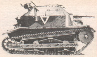 Mały czołg rozpoznawczy TK, model seryjny: widok z boku.